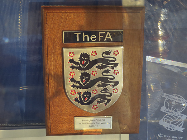 FA Cup Winners Plaque